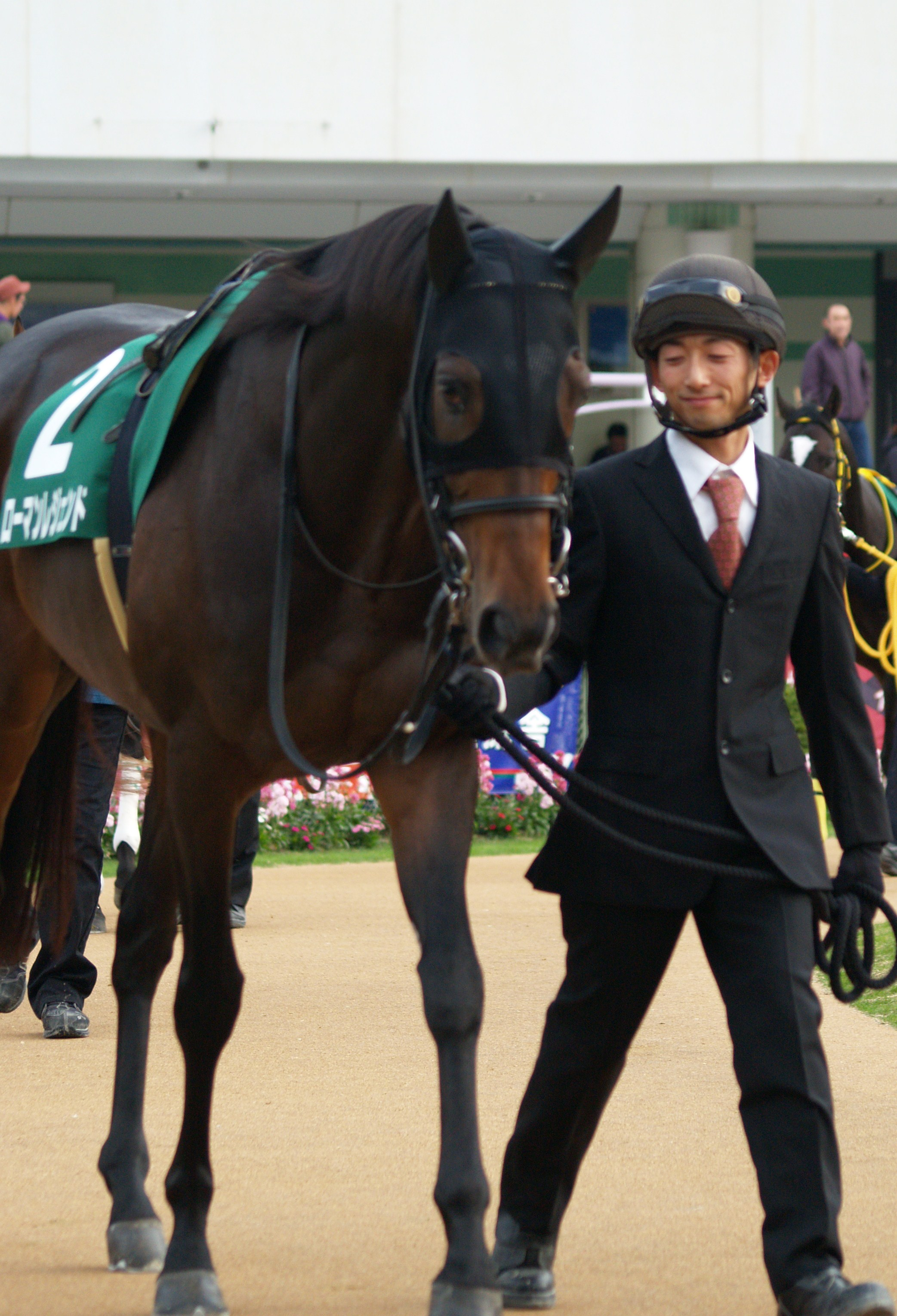 2012年11月4日＠みやこS(GⅢ)にて。